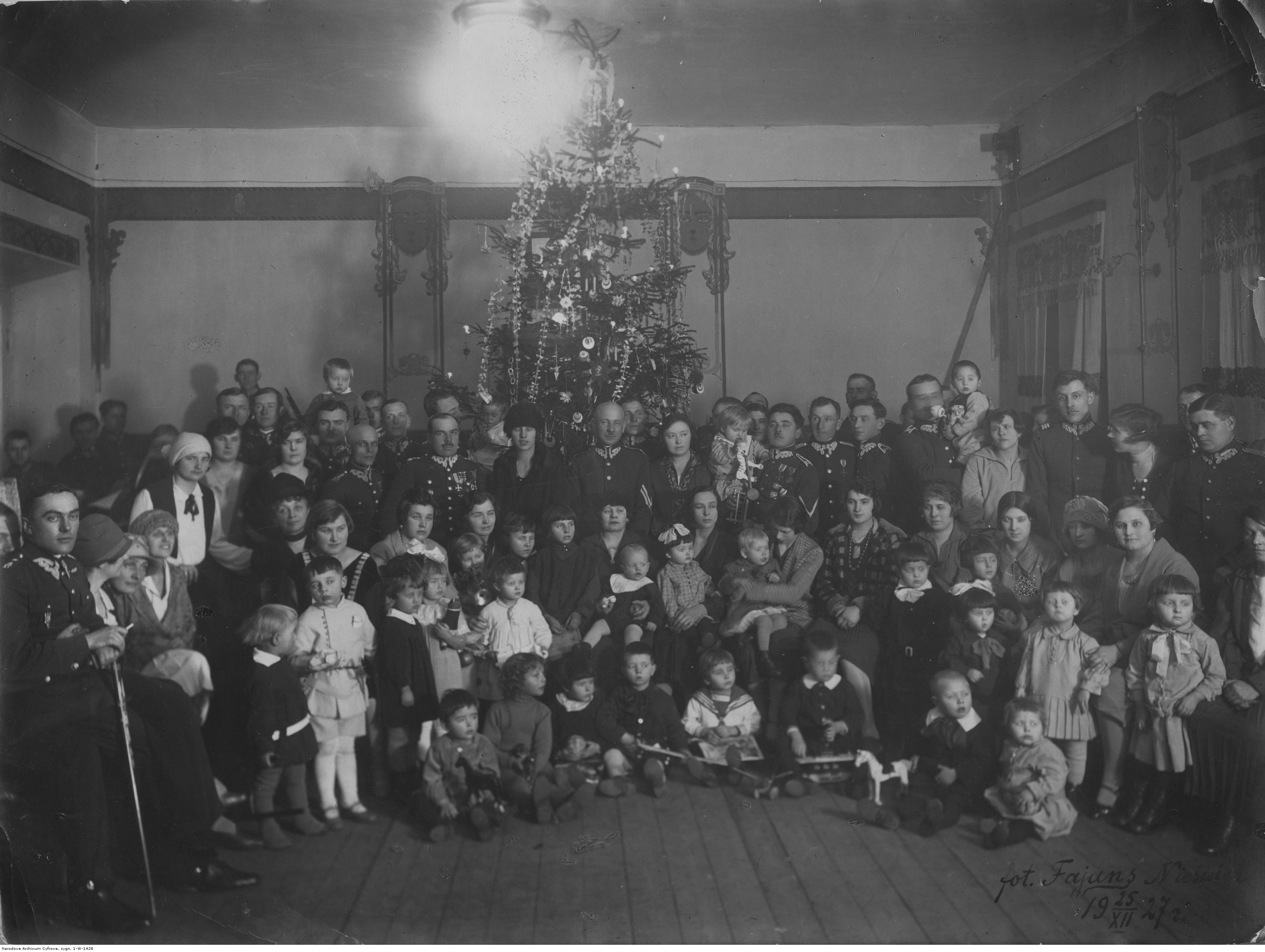 Gwiazdka dla dzieci pułkowych 27 Pułku Ułanów w Nieświeżu; 24 grudnia 1928. Fotografia grupowa uczestników uroczystości zorganizowanej przez Zofię Rostworowską. Widoczny m.in. ppłk Stanisław Rostworowski (stoi 5. z lewej w 3. rzędzie, z wąsami). Koncern Ilustrowany Kurier Codzienny - Archiwum Ilustracji. Sygnatura: 1-W-1428